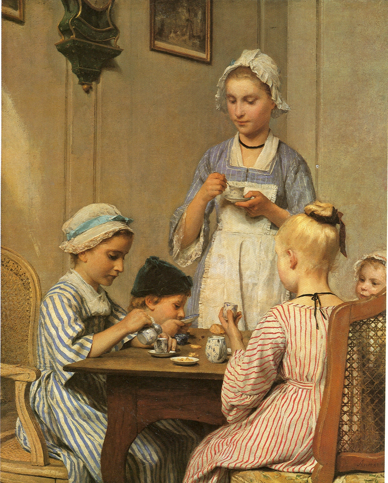 Kinderfrühstücklabel QS:Lde,"Kinderfrühstück"